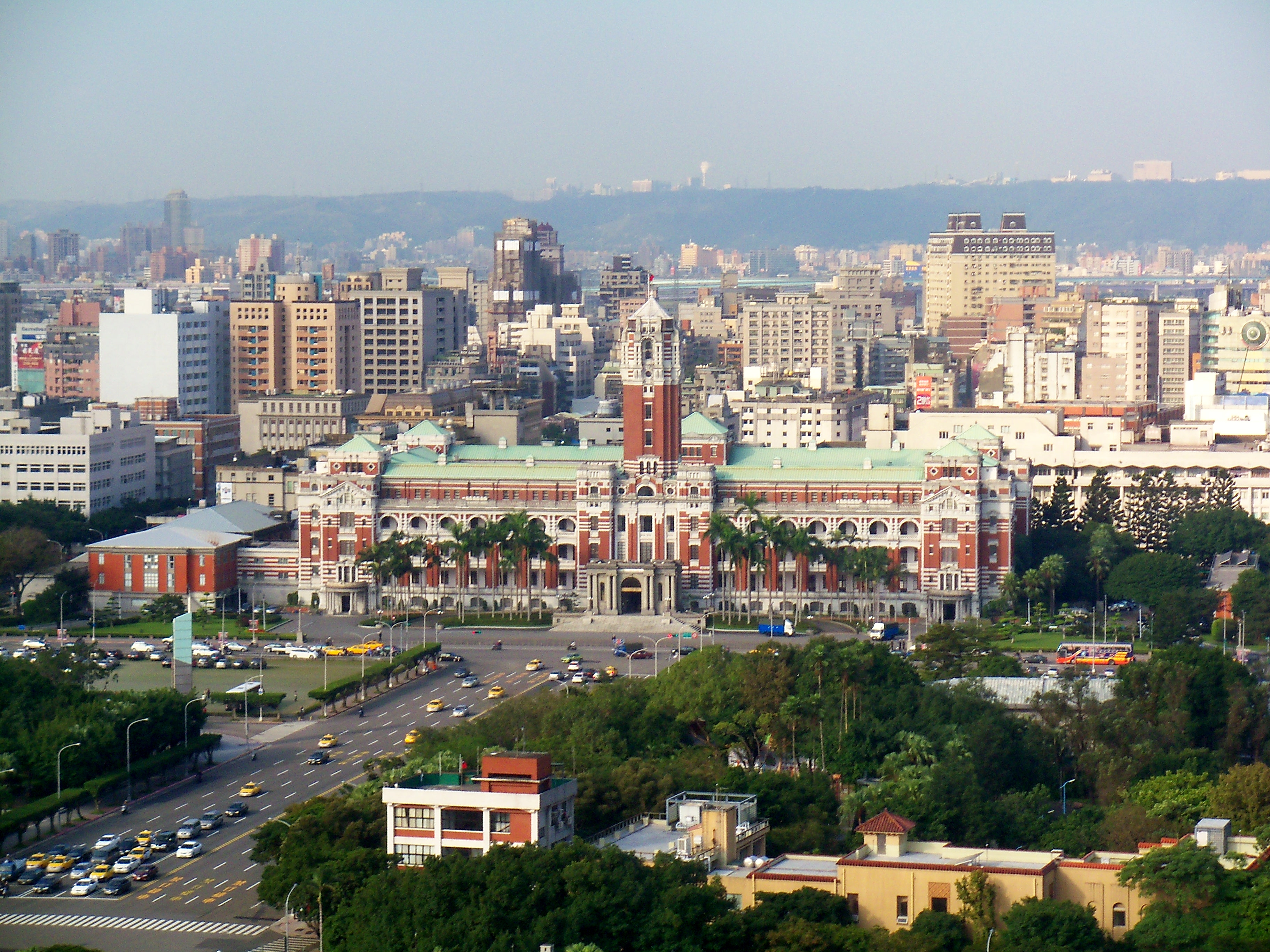 台大病院東院区南病院ビルC棟14階から望む中華民国総統府東側。